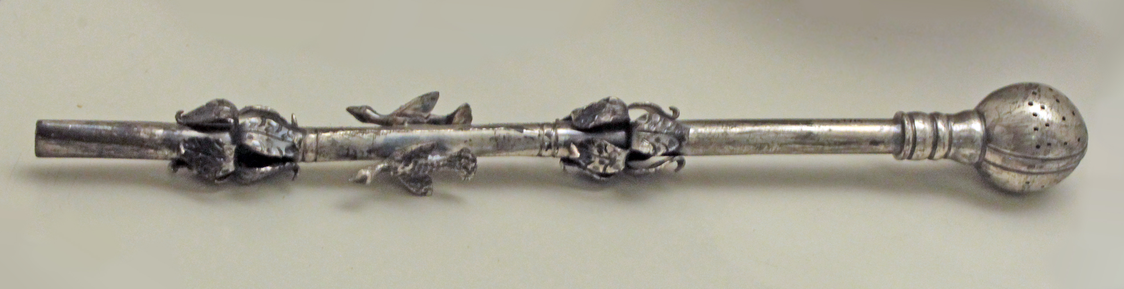 Bombilla